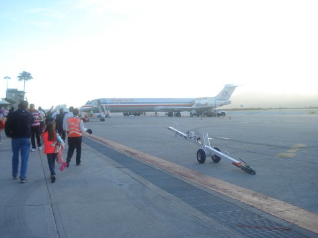 Avión de American Airlines estacionado en SJD